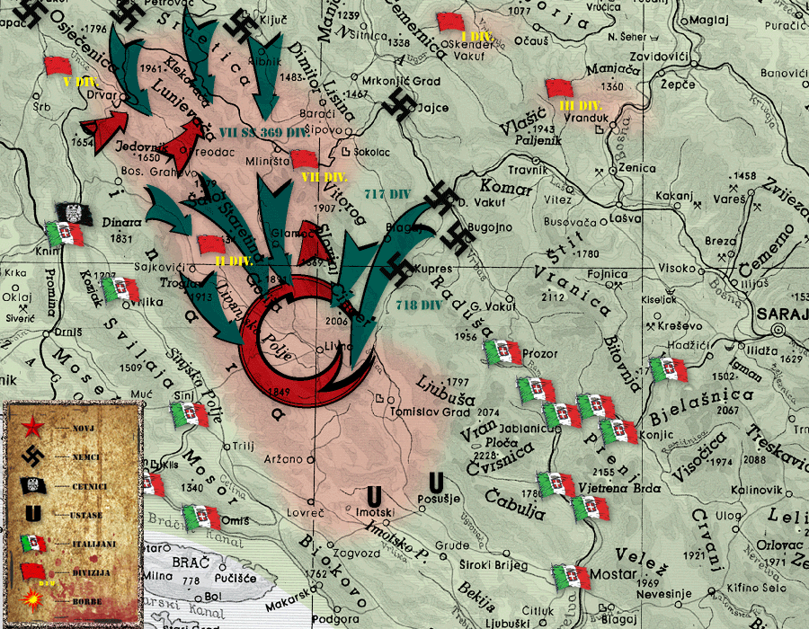 Немачки план операције Вајс II. План се ослањао на претпоставку да ће италијанска одбрана на Неретви и Динари издржати, те да ће четири немачке дивизије концентричним наступањем опколити и уништити снаге НОВЈ у области Ливна